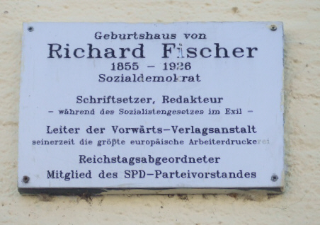 Kaufbeuren, Tafel am Geburtshaus von Richard Fischer